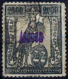 Почтовая марка ССР Армениb, 1923